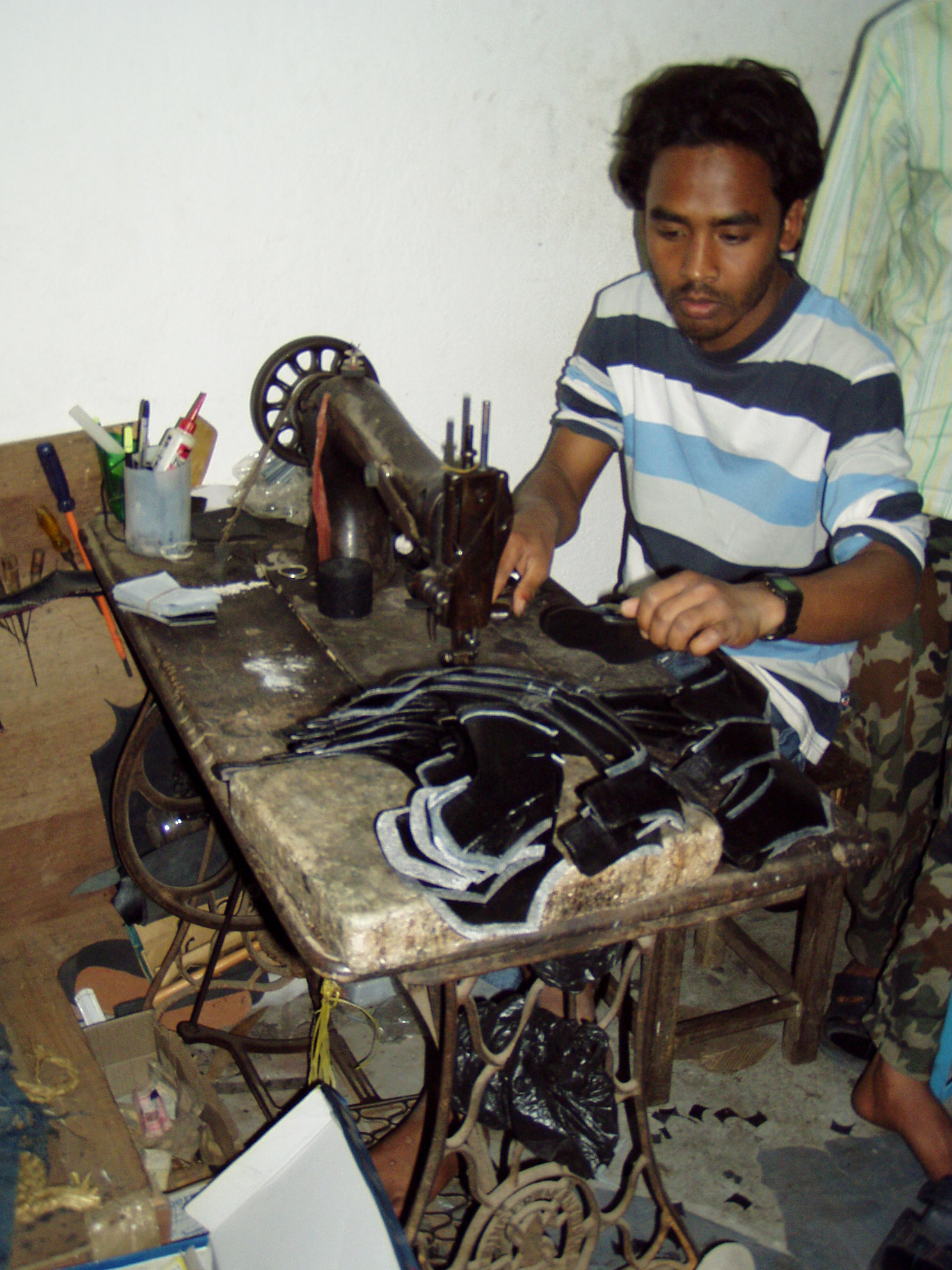 Shoemaker in Kathmandu (Nepal)